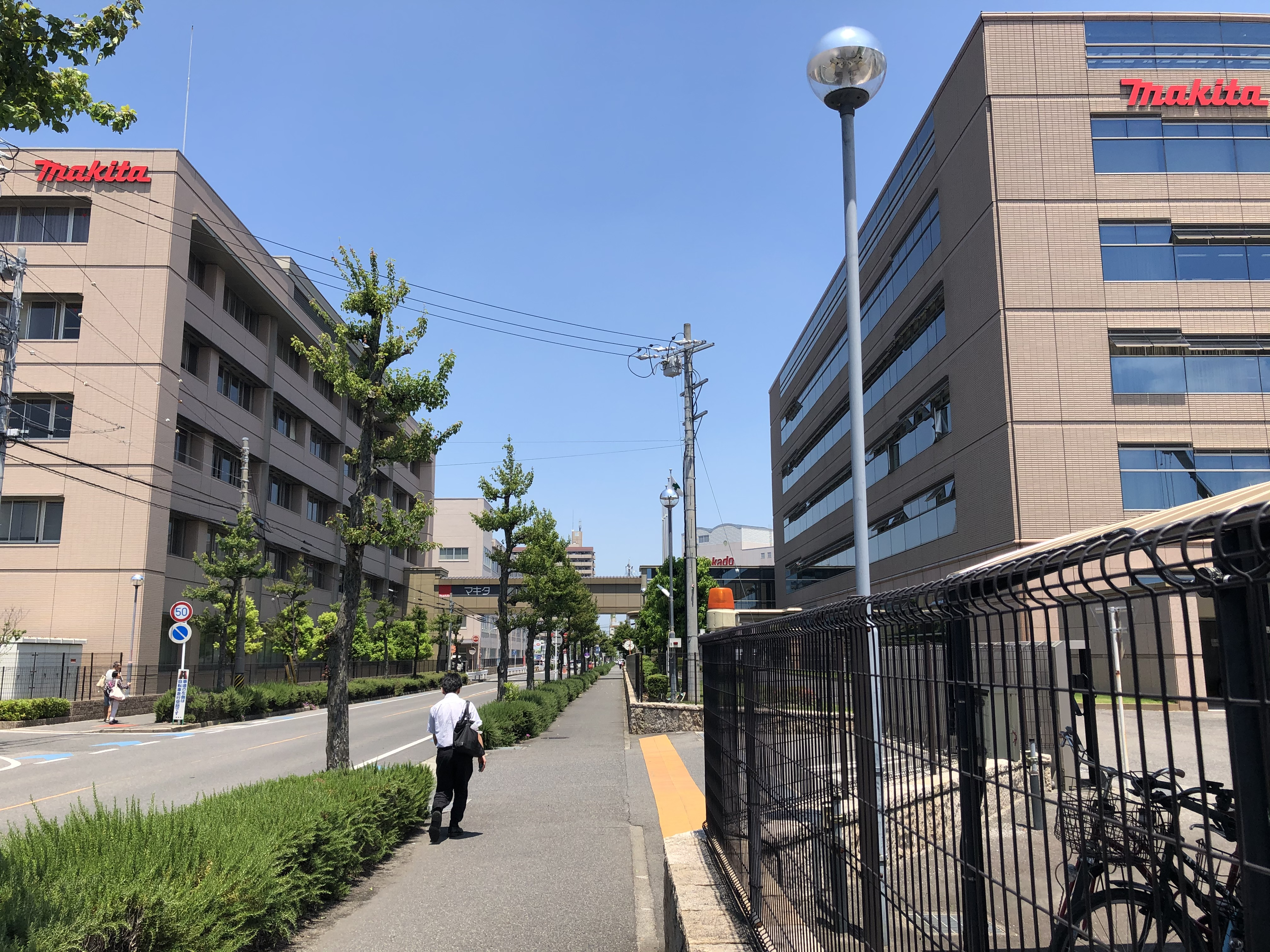 マキタ本社（安城市住吉町）